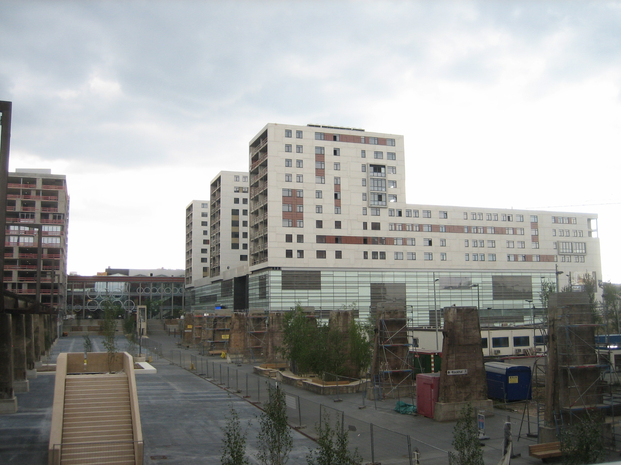 D' Place de l'Académie op Belval, am August 2010. Lénks, en Hotel am Réibau; hannen, Belval Blaza 1; riets, Belval Plaza 2. Kategorie:Belval